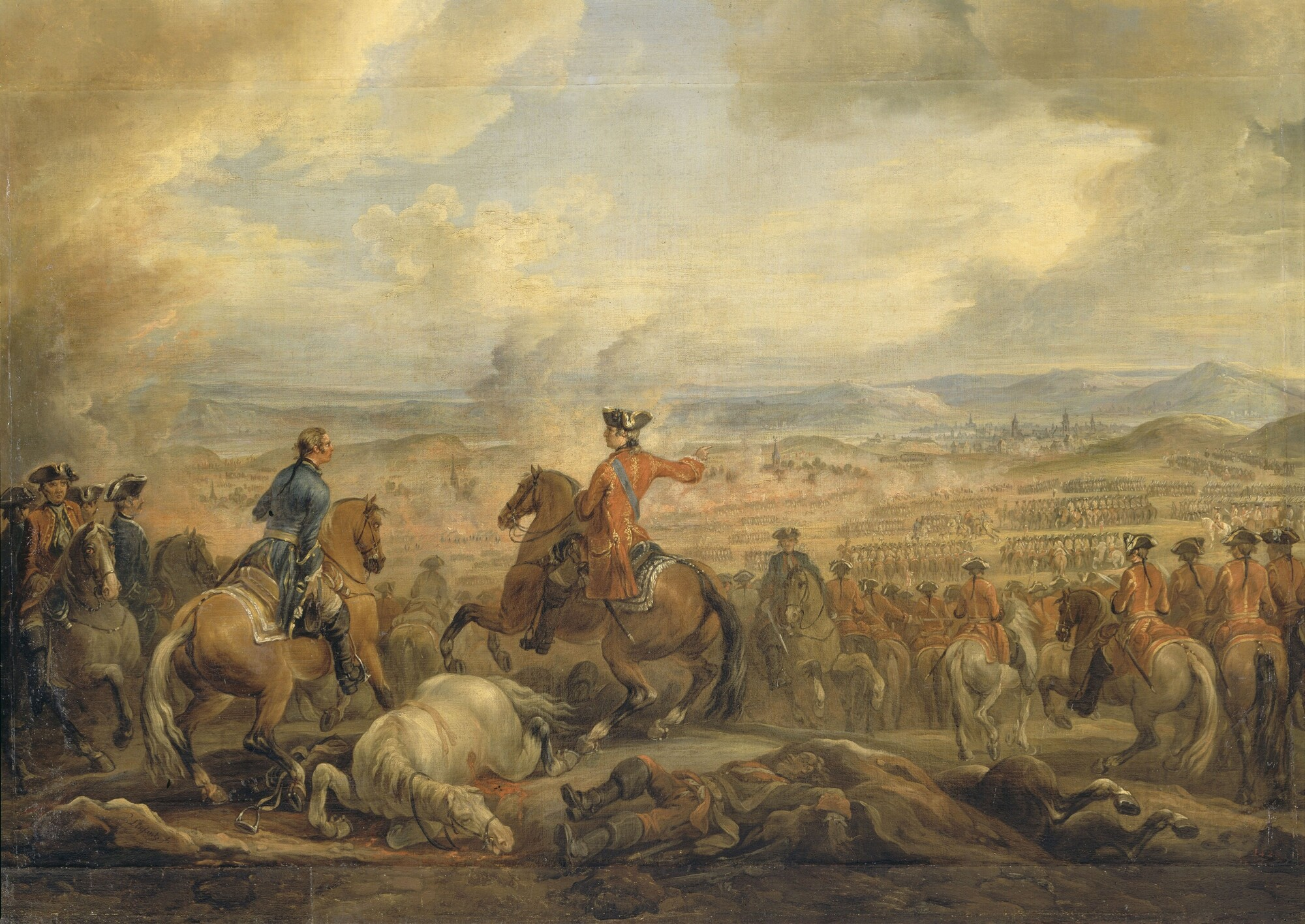 Épisode de la bataille de Rocoux, 11 octobre 1746. Victoire française. Guerre de Succession d'Autriche. Dimensions : 178 x 162 cm. Cadre : 197 x 180 x 9,5 cm. Œuvre (format avec agrandissement) : 91 x 146 cm. Matière et technique : huile sur toile.